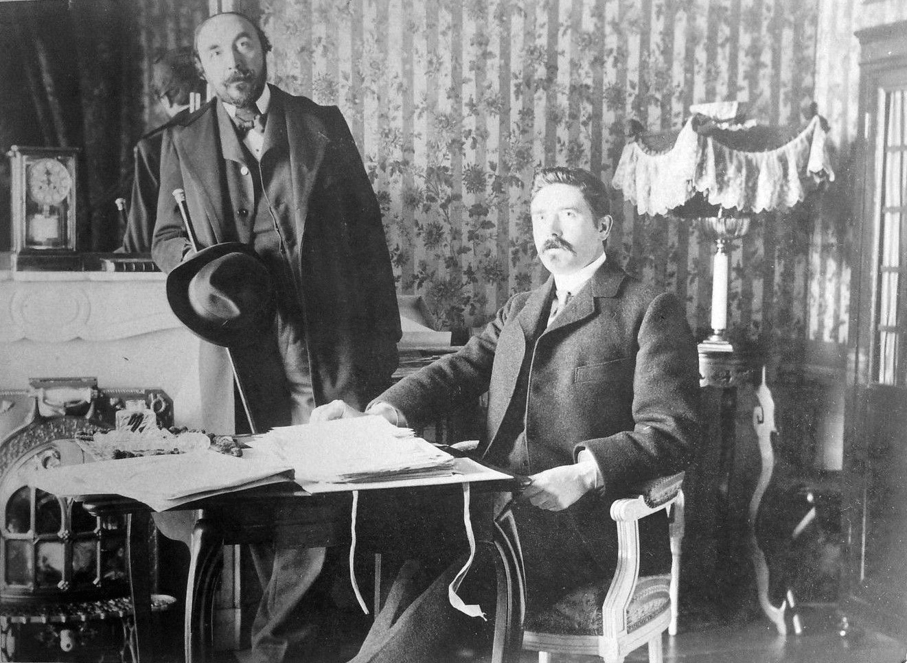 Photographie chez eux.